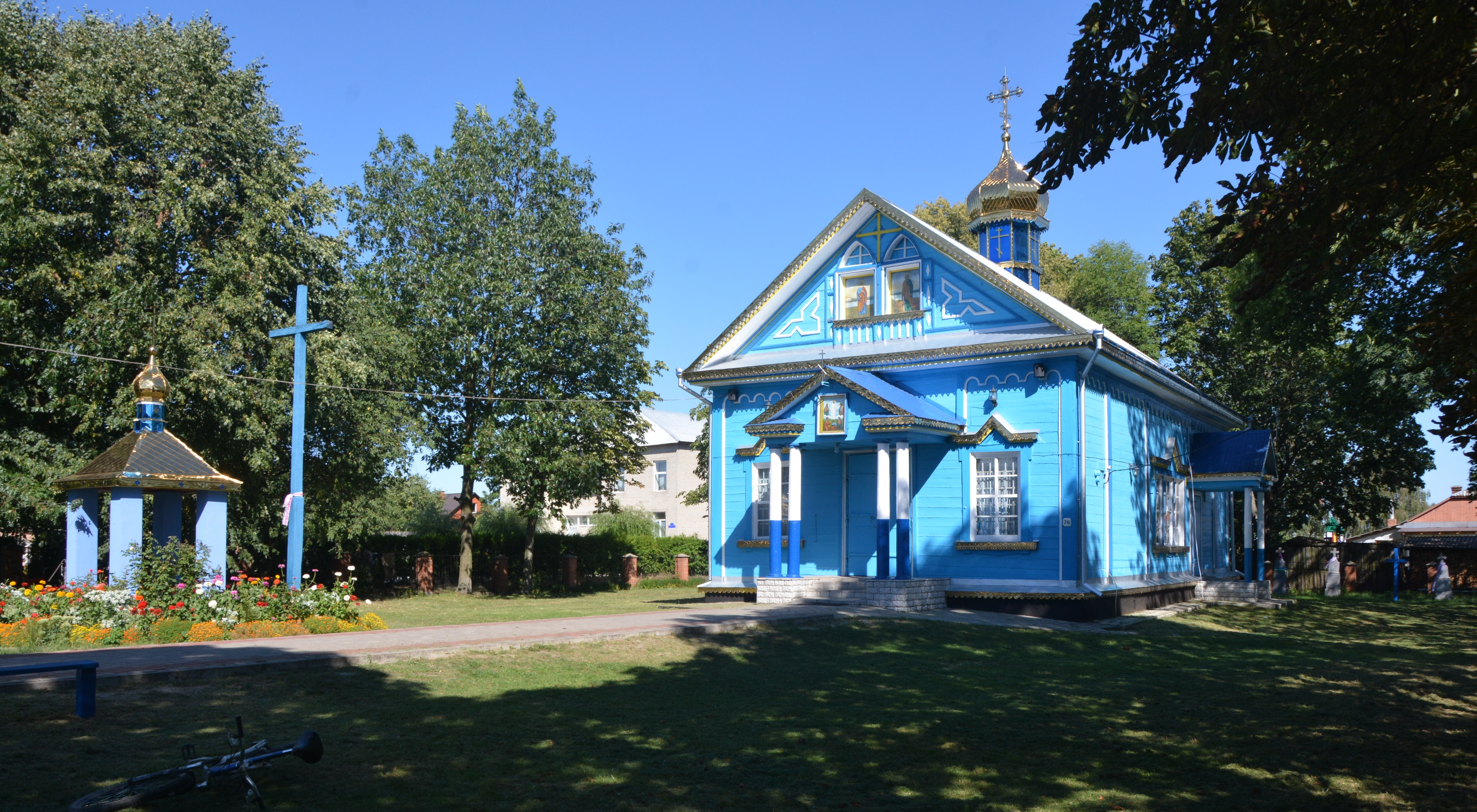 Преображенська церква (дер.), Стара Вижівка